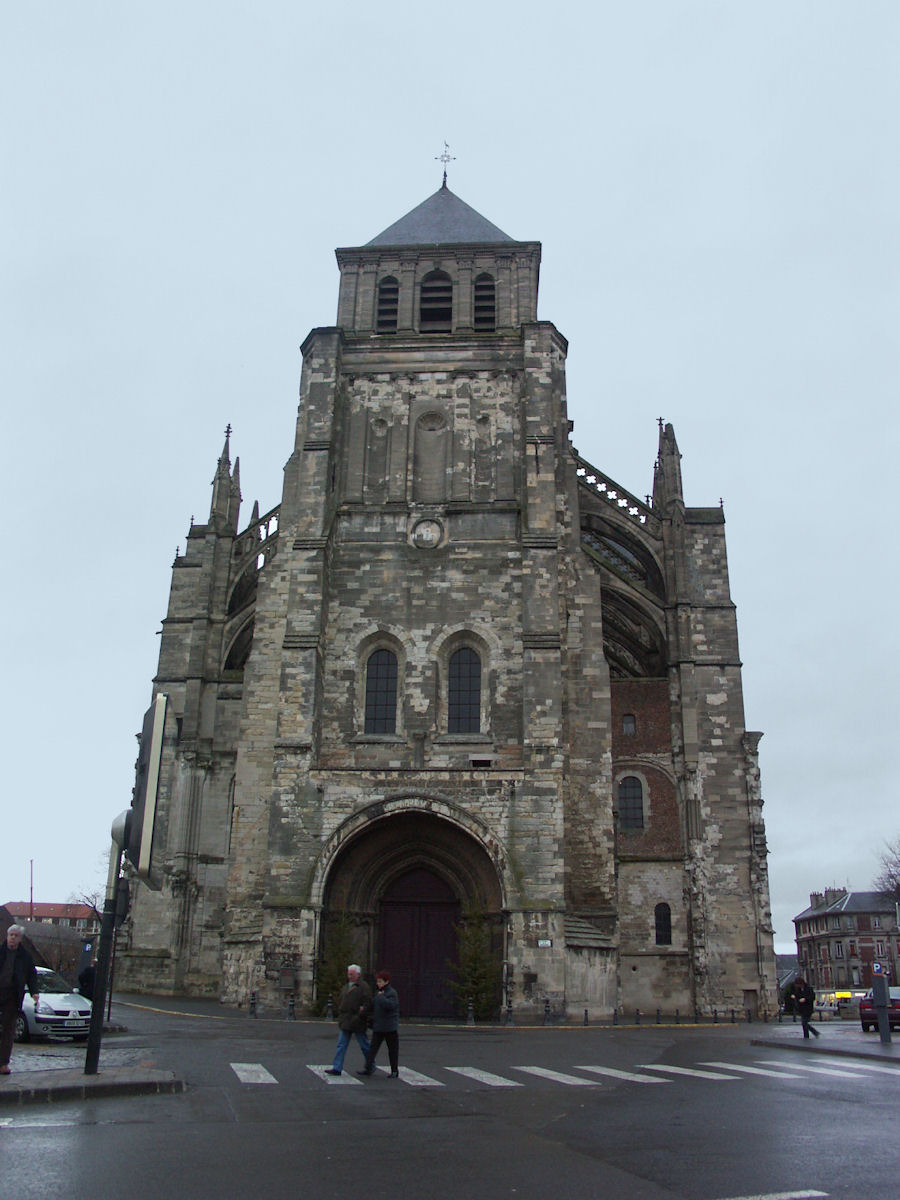 Basilique Saint-Quentin, France